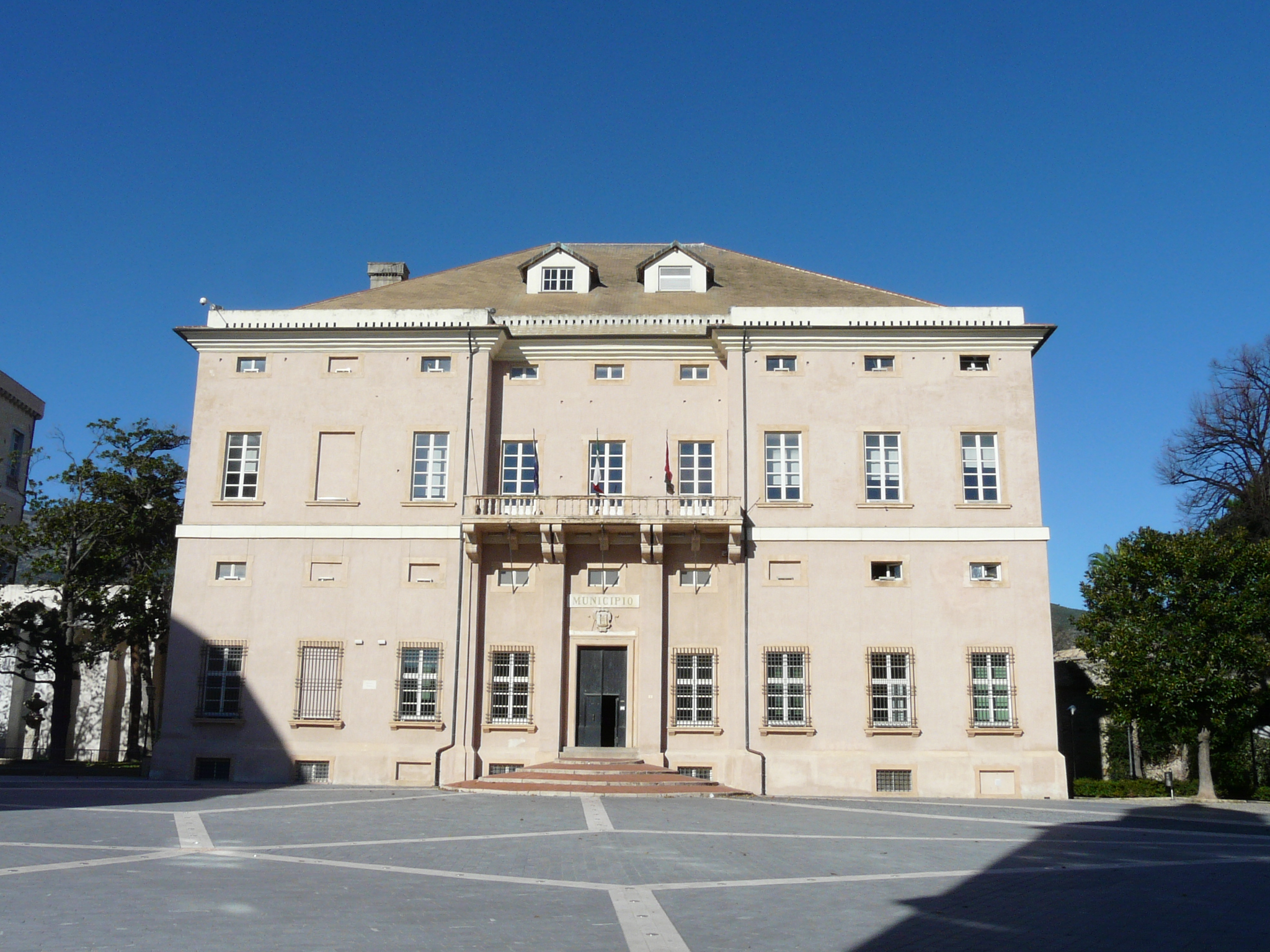 Palazzo Doria sede del municipio, Loano, Liguria, Italia